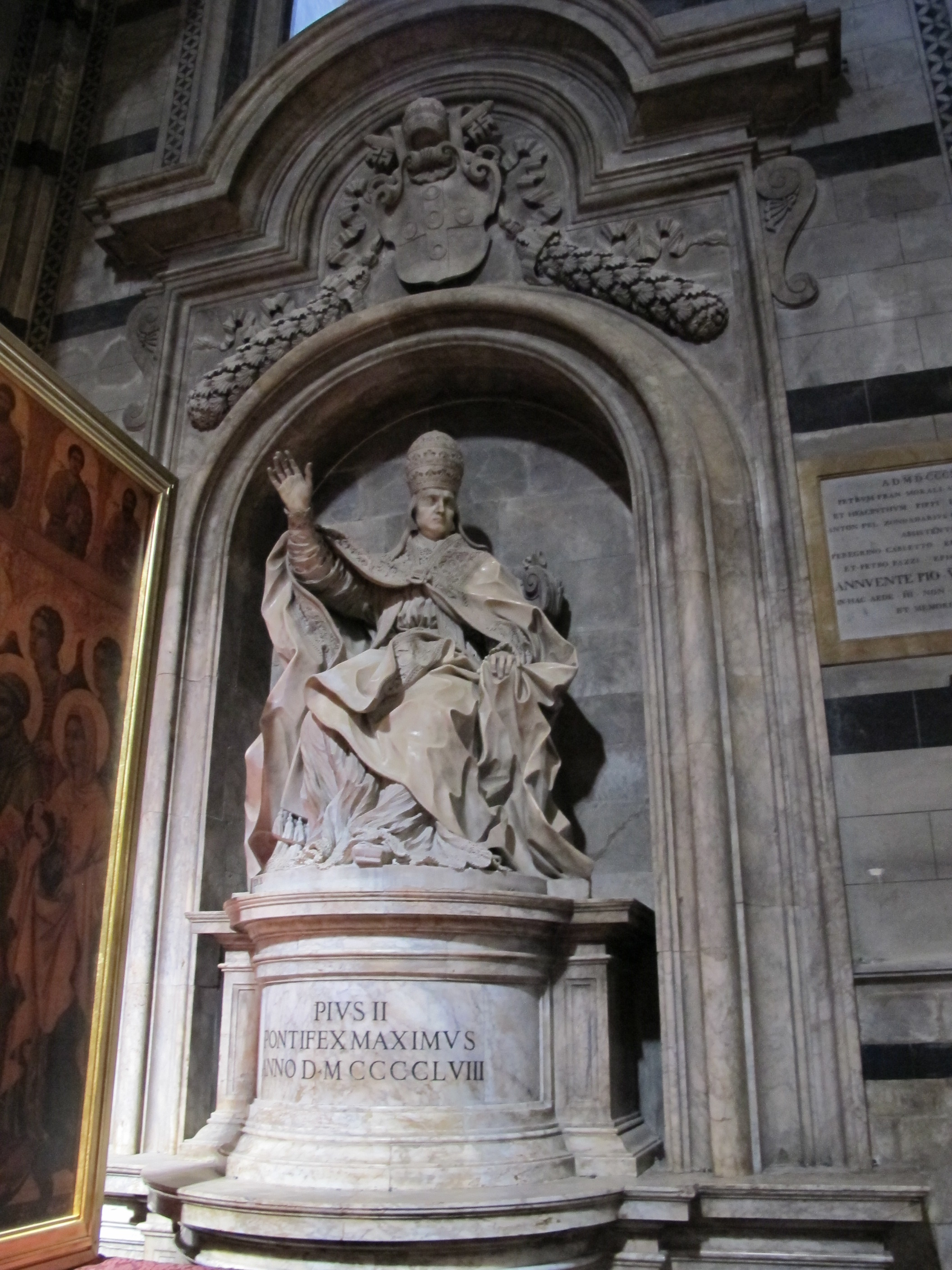 Papa Pio II di Giuseppe Mazzuoli (1692-1695)